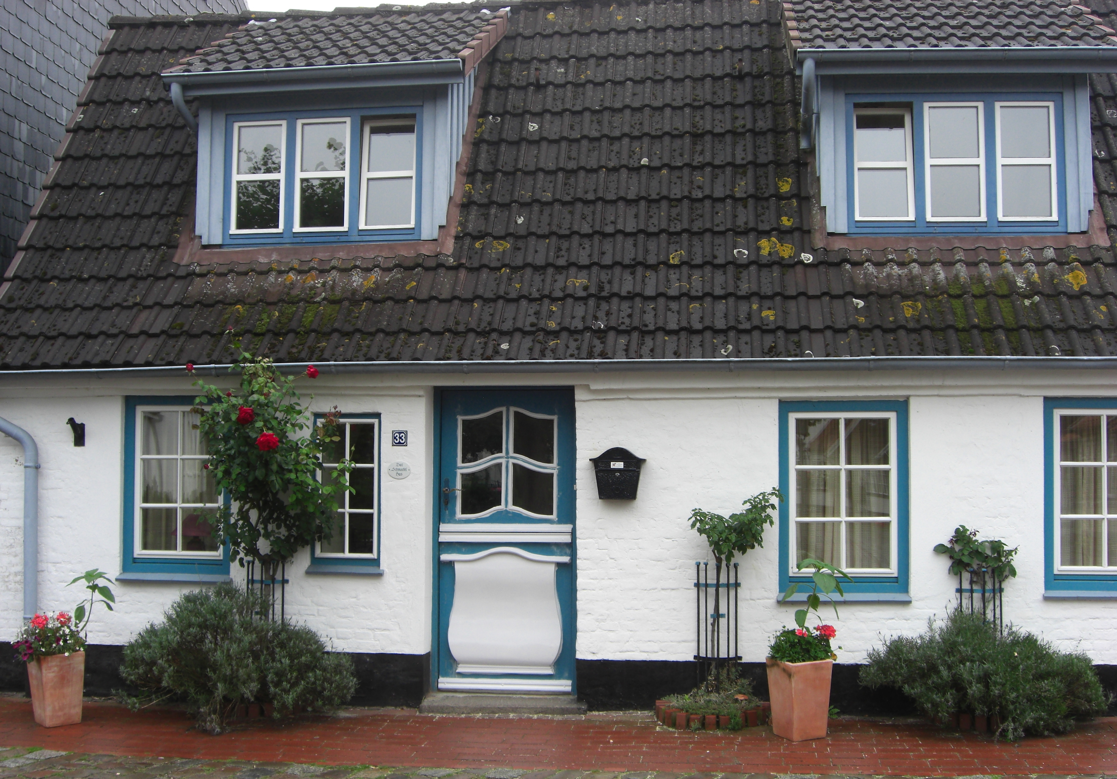 Haus in Holm